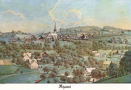 Rehetobel auf einer Tuschfederzeichnung von ca. 1830, J.U. Fizi aus Speicher